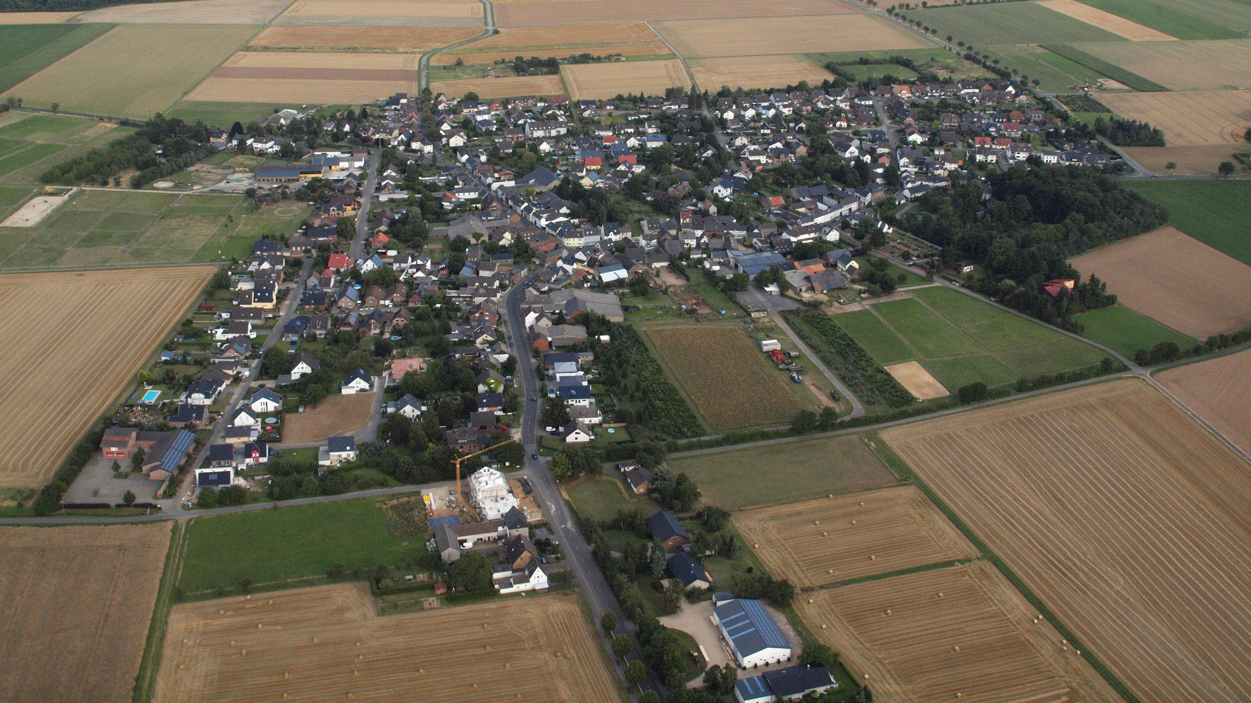 Palmersheim, Luftaufnahme (2015)